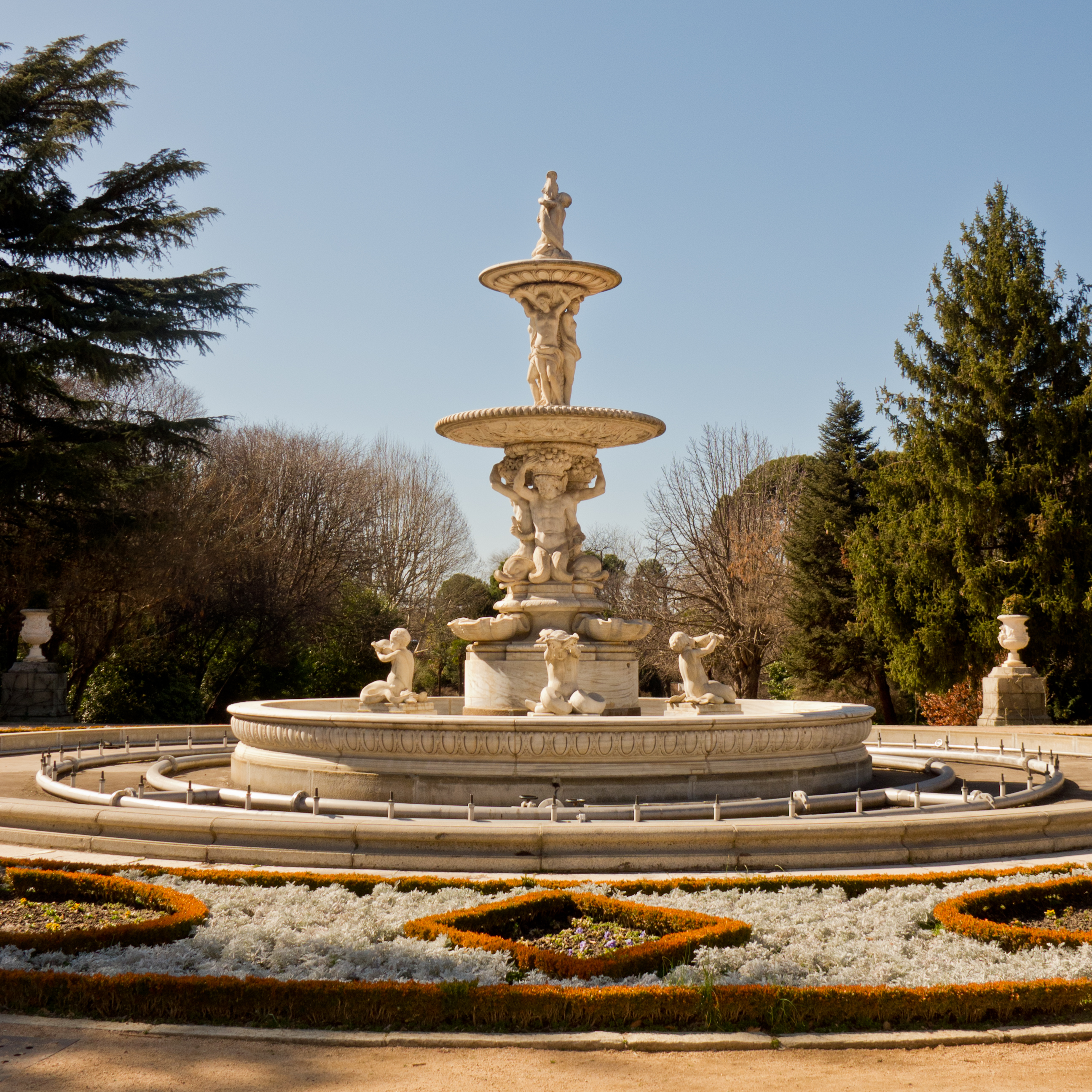 Fuente de las Conchas, Jardines del Campo del Moro, Madrid.